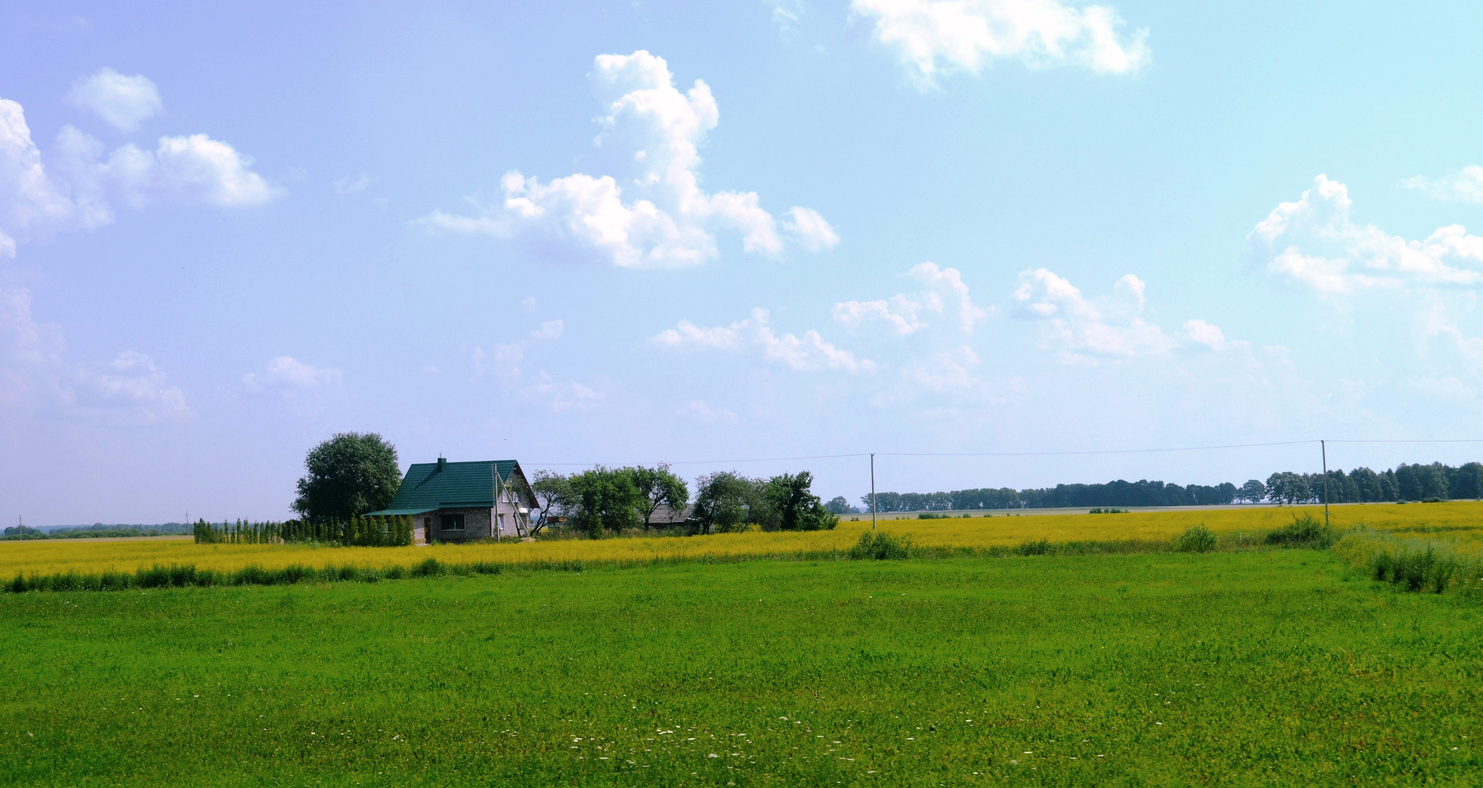 Kryžiauka, Ukmergės raj.